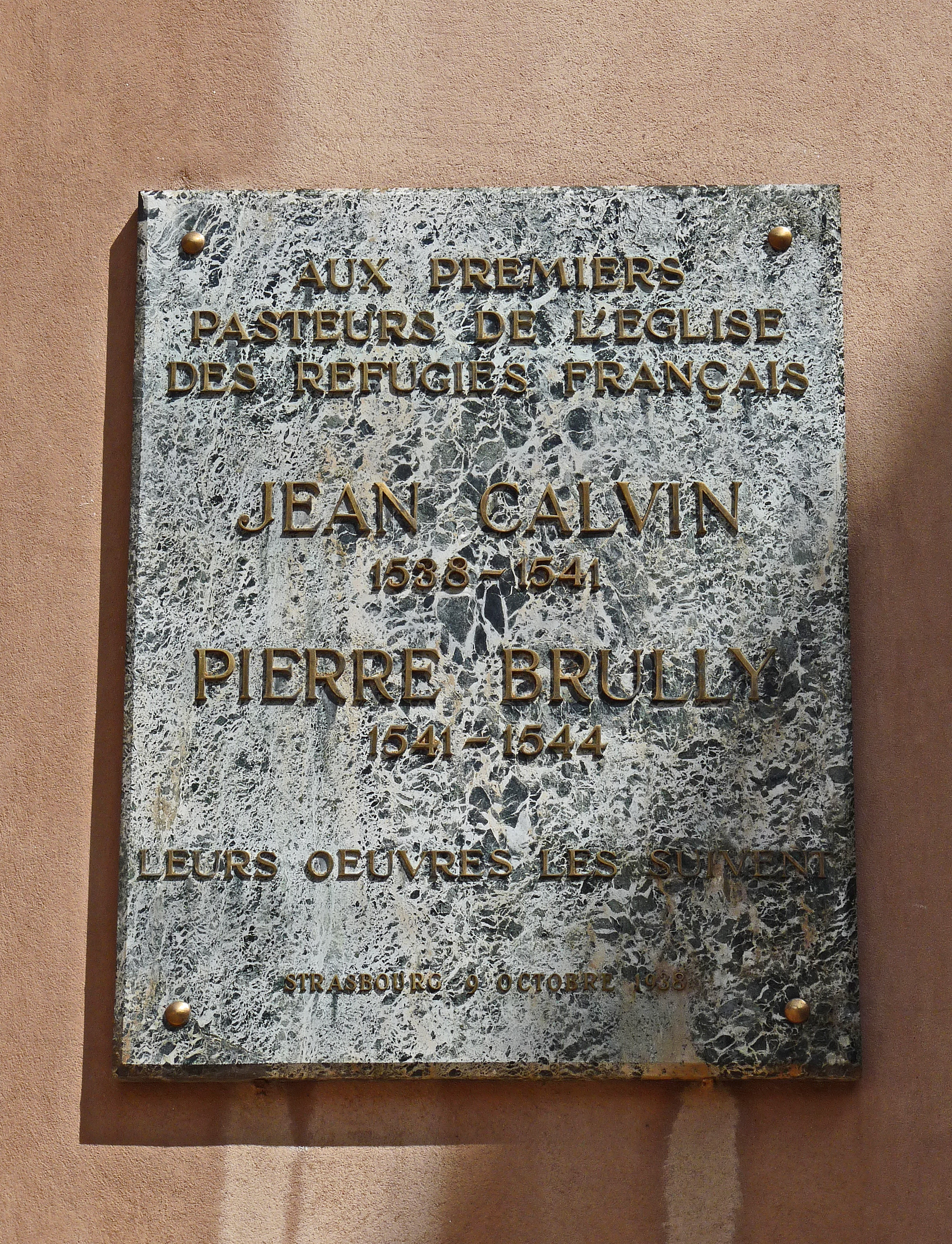 Strasbourg : Eglise réformée du Bouclier, 4, rue du Bouclier. Plaque à la mémoire de Jean Calvin et Pierre Brully, apposée le 9 octobre 1938.